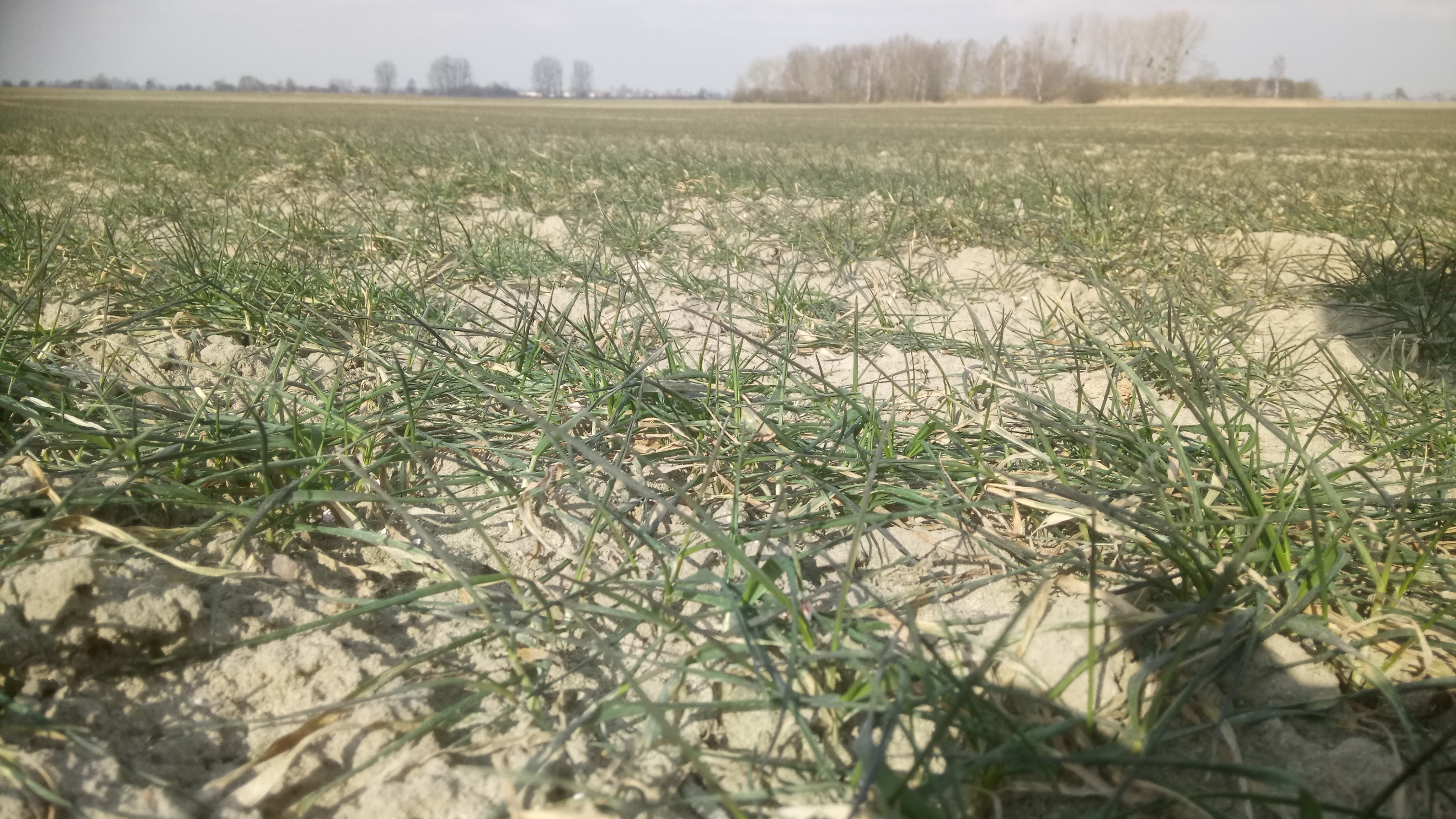 lekki wysmalenie zboża